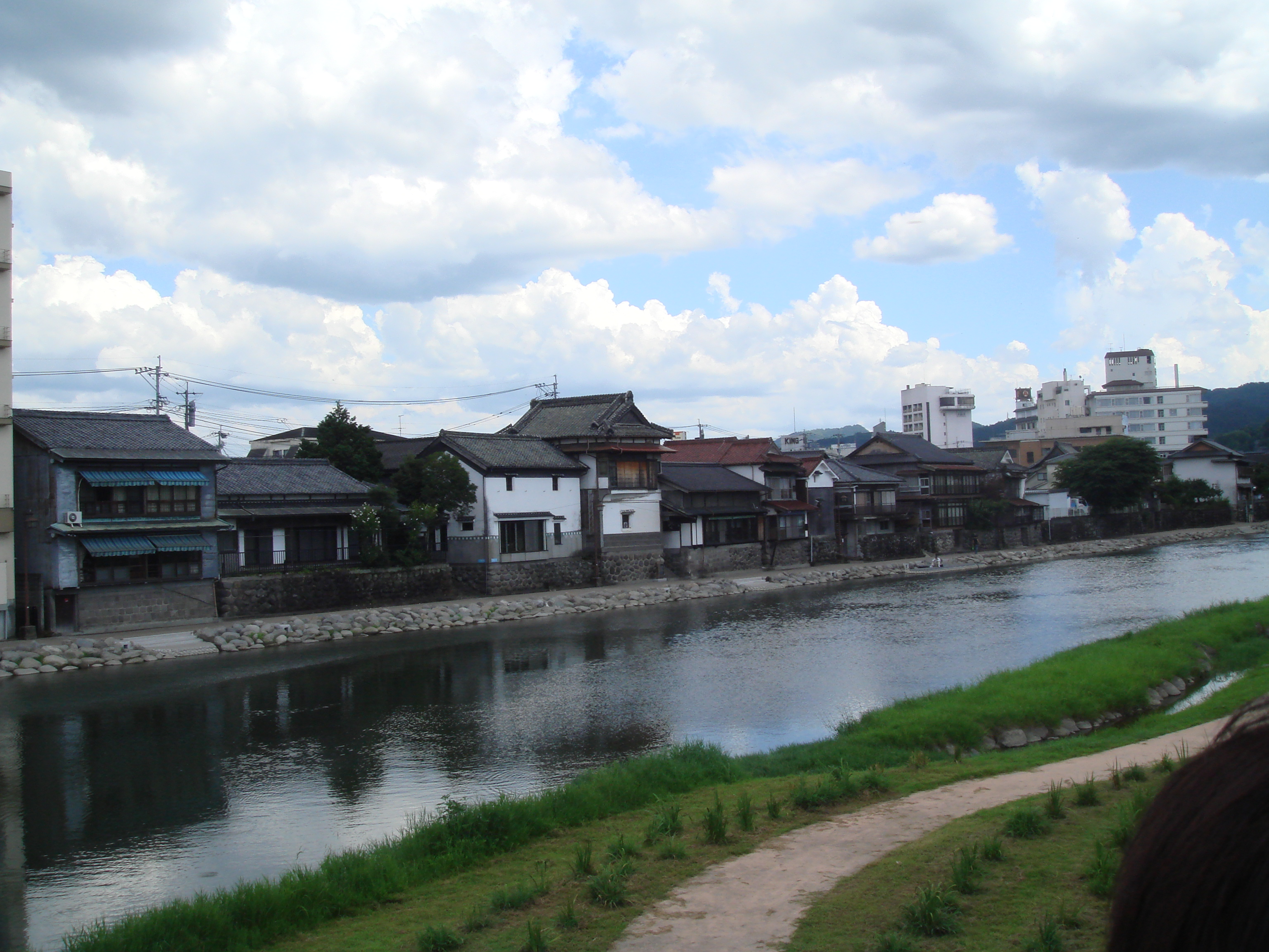 大分県日田市隈町の小股川沿いにある町屋を亀山公園内より撮影したもの。